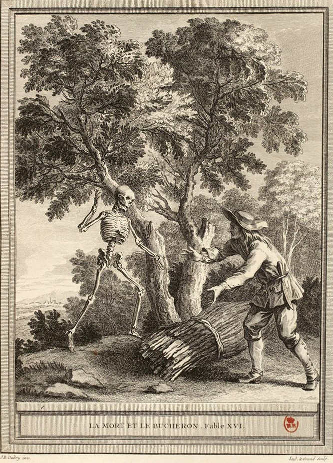 Gravure réalisée par Louis Legrand d'après un dessin de Jean-Baptiste Oudry représentant la fable La mort et le bûcheron de Jean de La Fontaine (fable 16 du livre I). Cette gravure est parue dans l'édition complète des fables de La Fontaine, parue en quatre tomes chez l'éditeur Desaint & Saillant, rue saint Jean de Beauvais à Paris, 1755-1759.